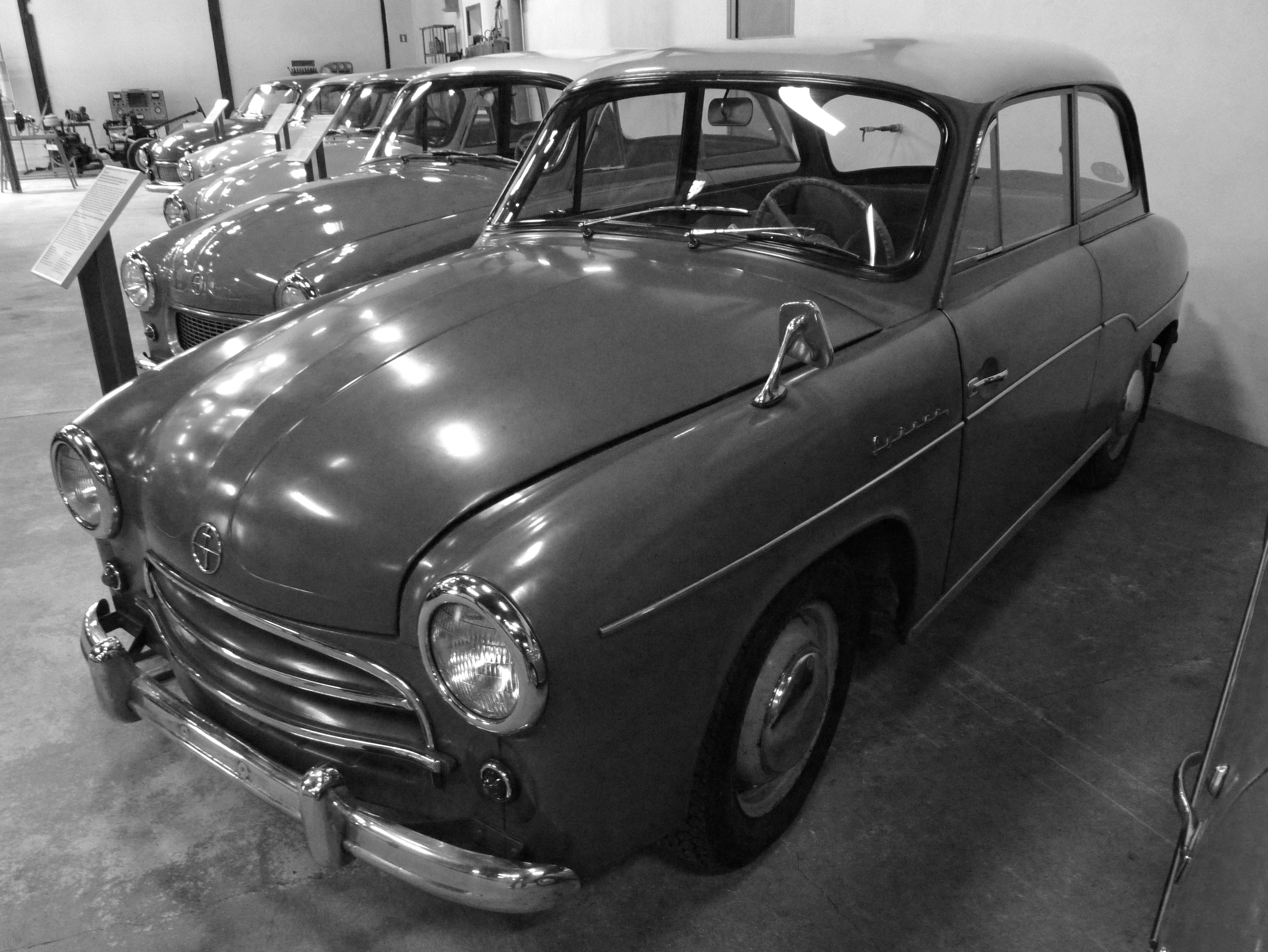 FSO Syrena 102 in Muzeum Inżynierii Miejskiej in Kraków.